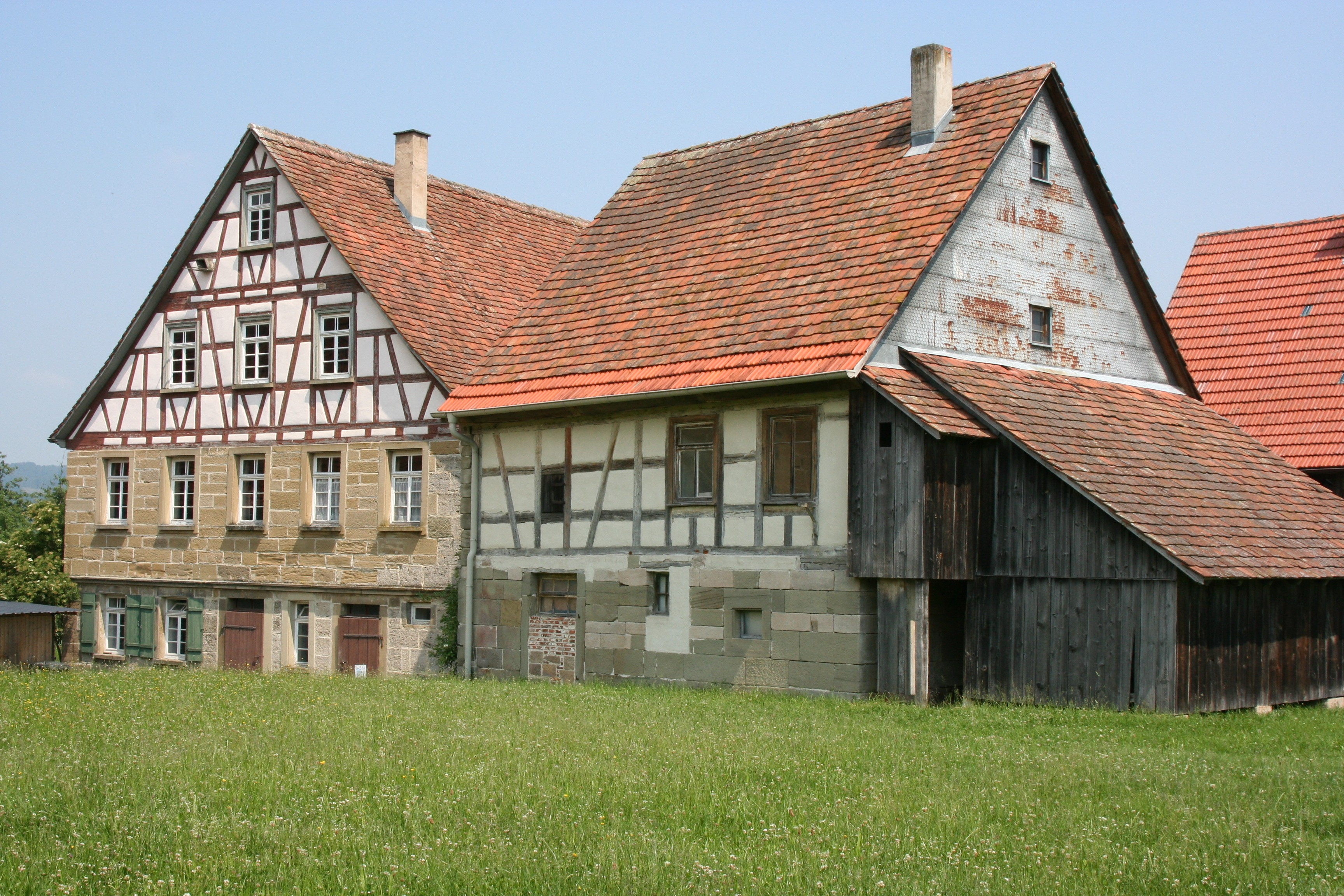 Links Wohn-Stall-Haus aus Schönenberg, rechts Hinterhaus aus Oberrot im Freilandmuseum Wackershofen